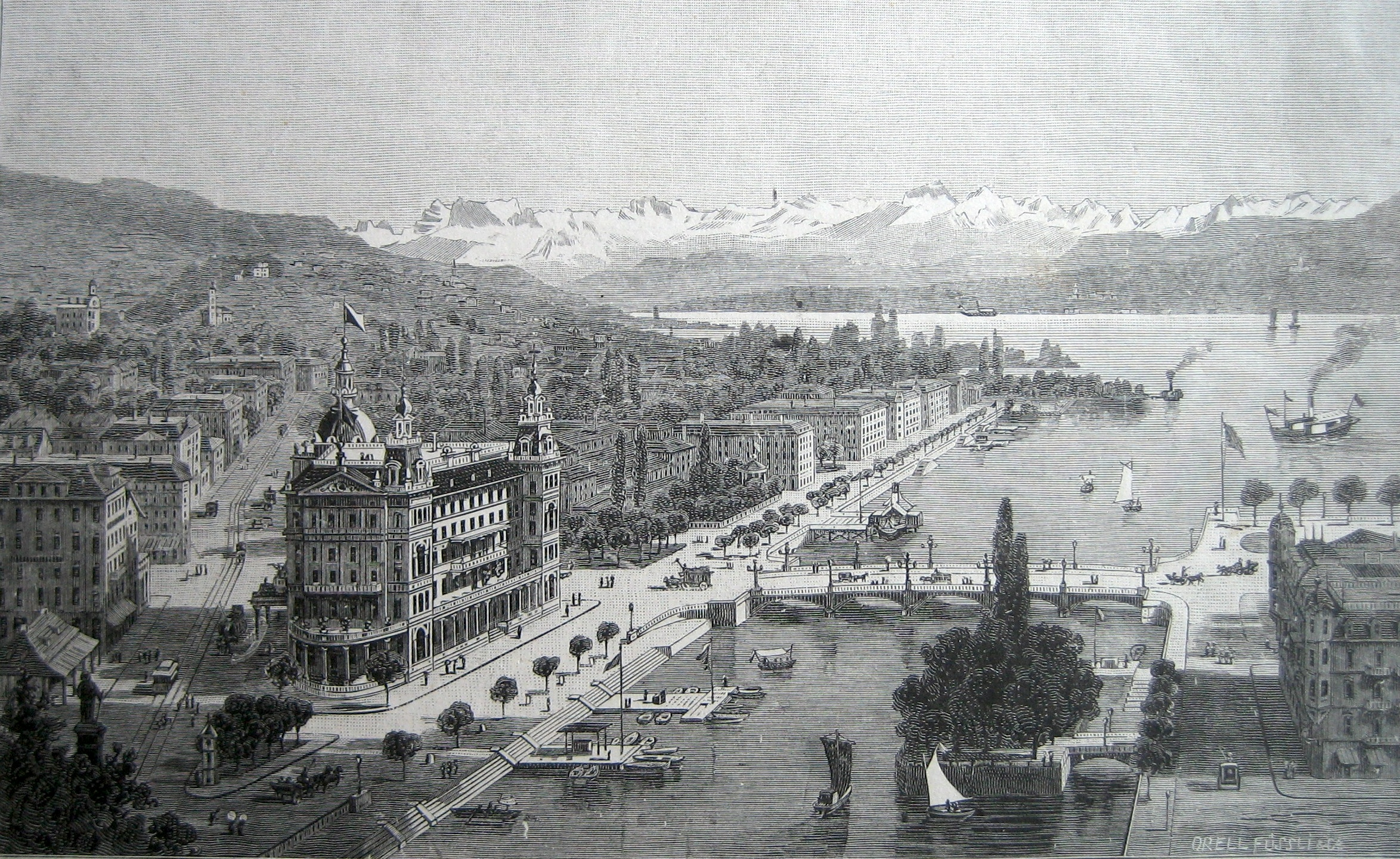 Zürich : Das Grandhotel Bellevue 1890. Am rechten Bildrand ist das Bauschänzli zu erkennen.